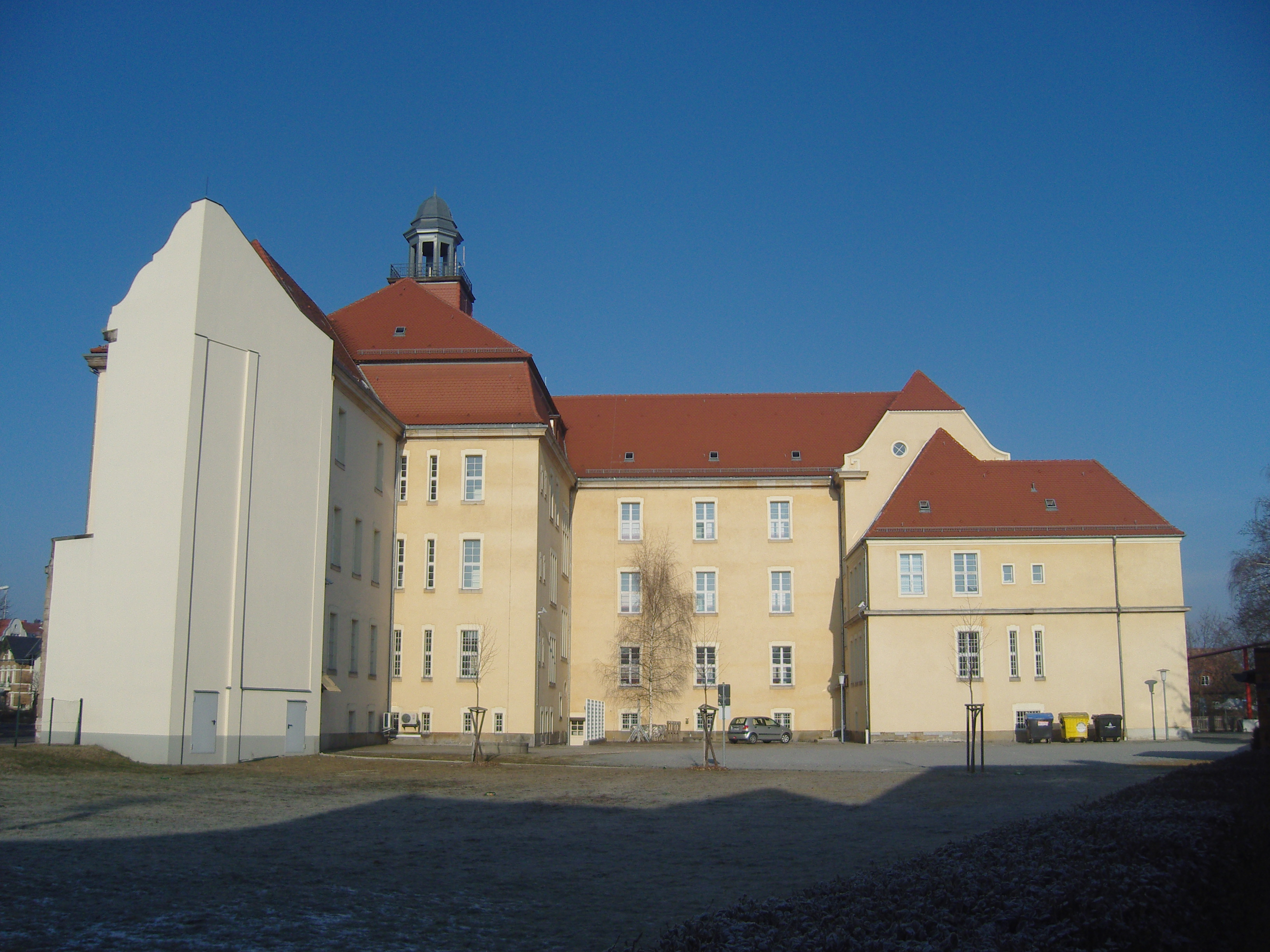 Ansicht des denkmalgeschützten Amtsgericht Senftenberg von der Elsterstraße